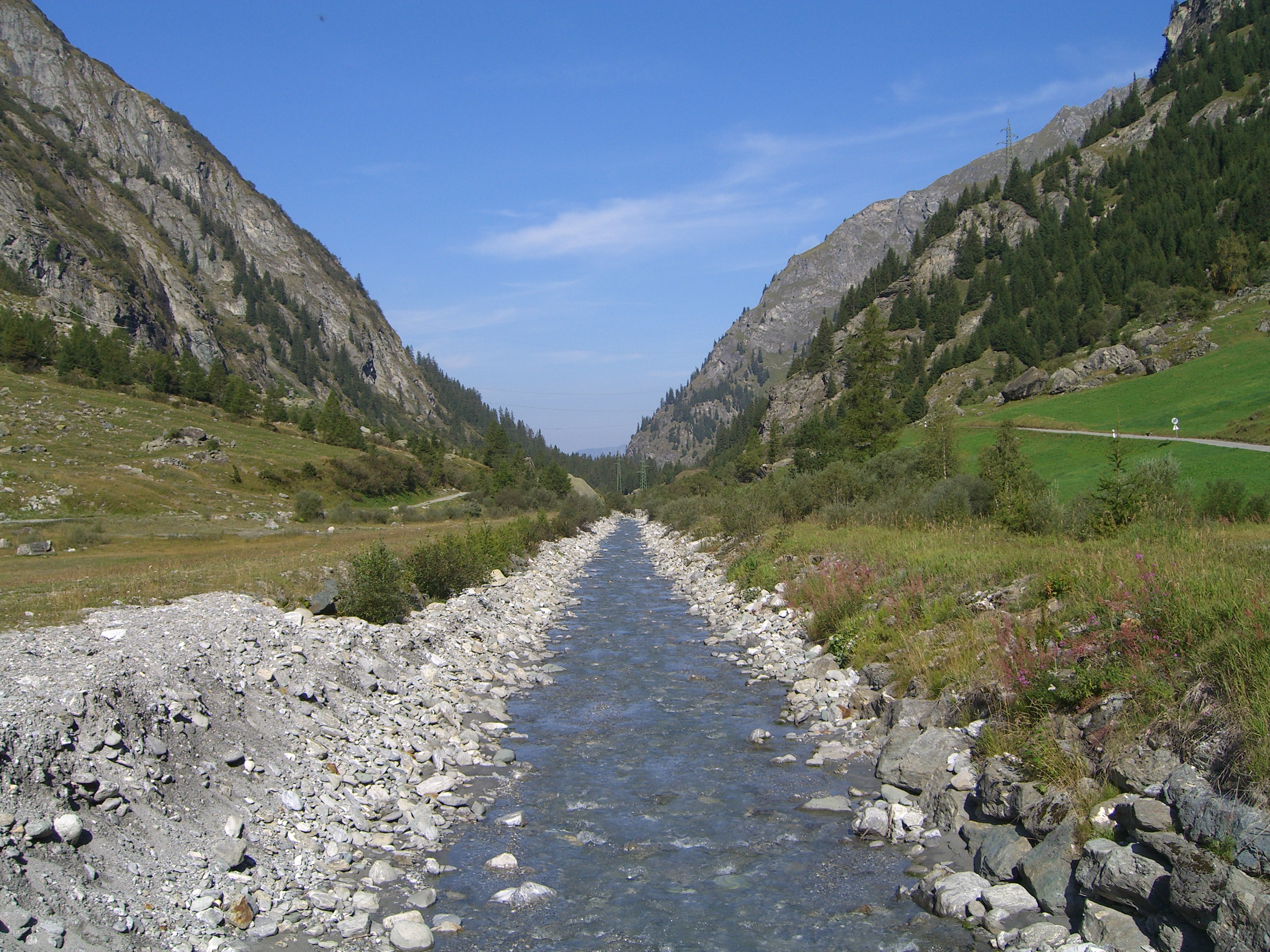 Dranse de Bagnes, Valais, Switzerland